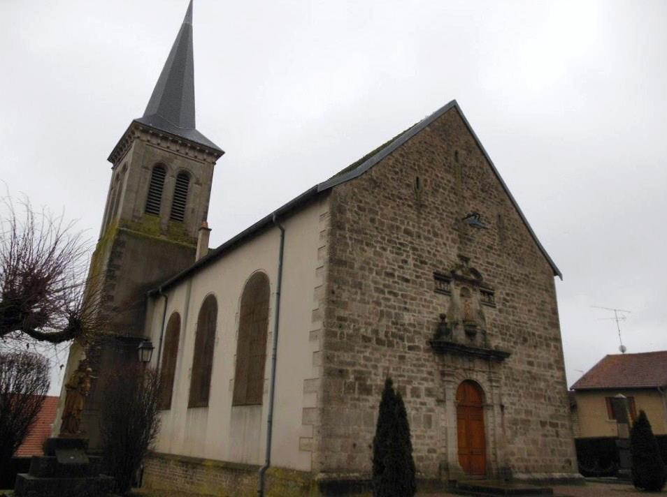 Photographie de l'église Sainte-Colombe (XVIIIe s), de Frebécourt (88).